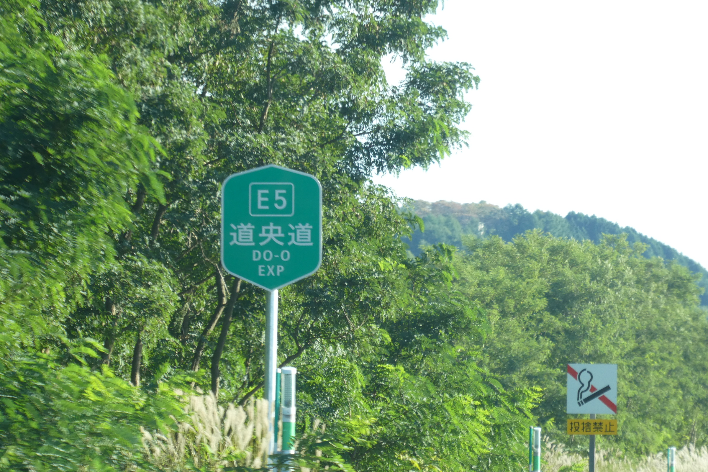 道央自動車道の高速道路ナンバリング標識。奈井江砂川インターチェンジ付近。